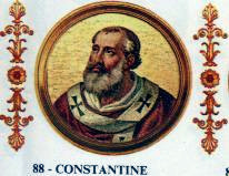 Pope Constantine